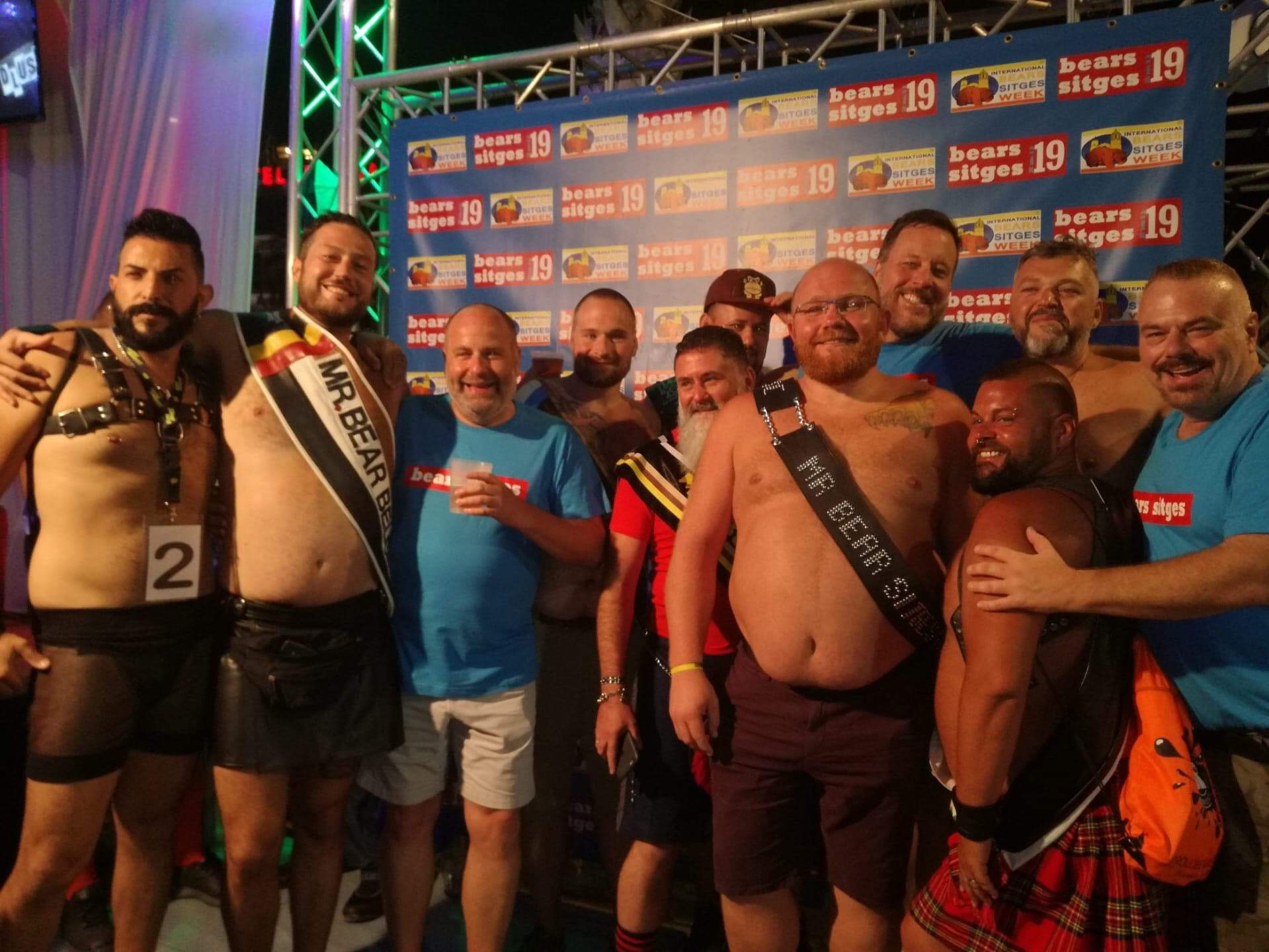 Suite à l'élection de Mr Bear Sitges 2019, photo de groupe ave plusieurs Misters Européens et les acteurs de la série "where the Bear Are".